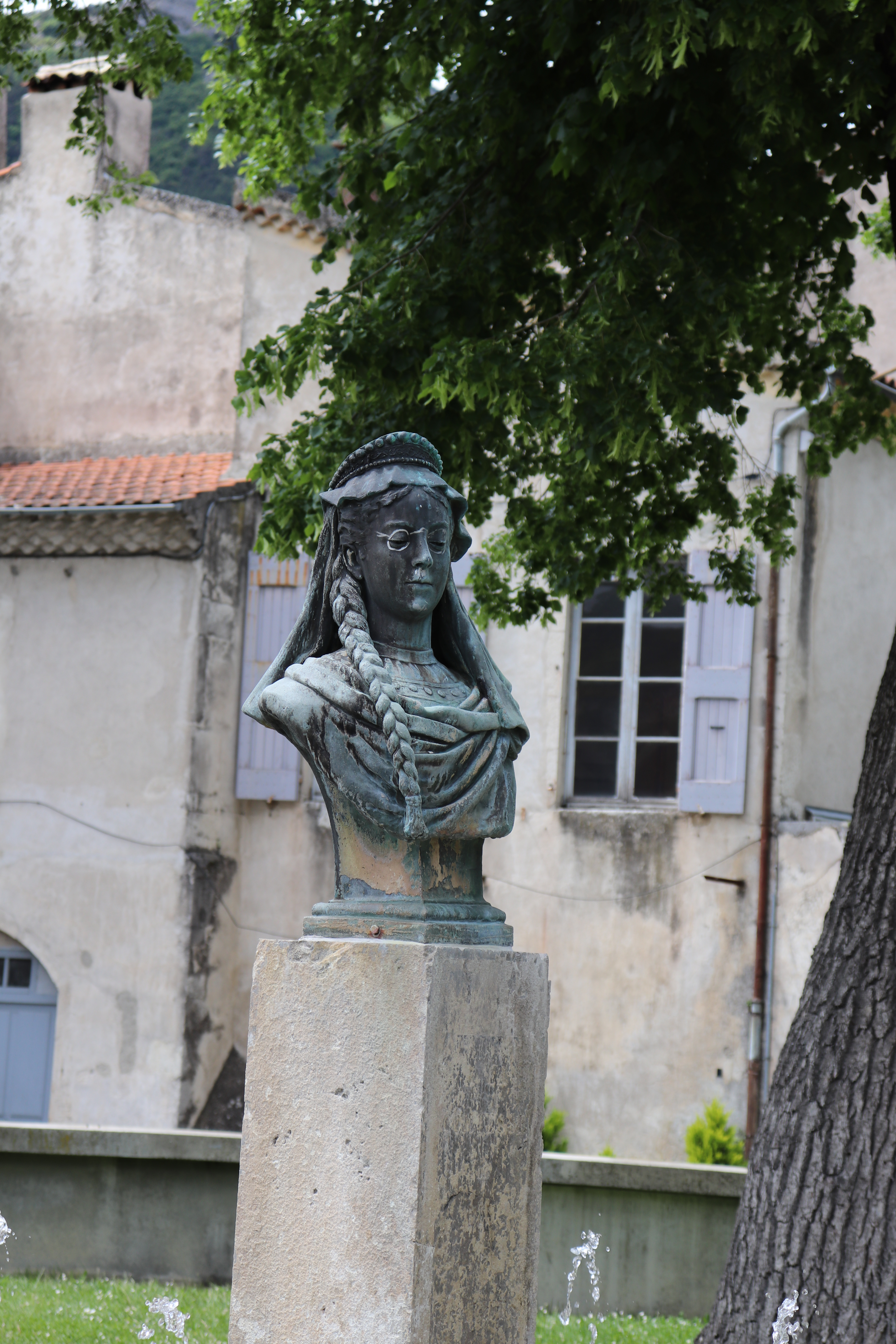 Portrait de la comtesse de Die, dans un square près du centre de la ville.